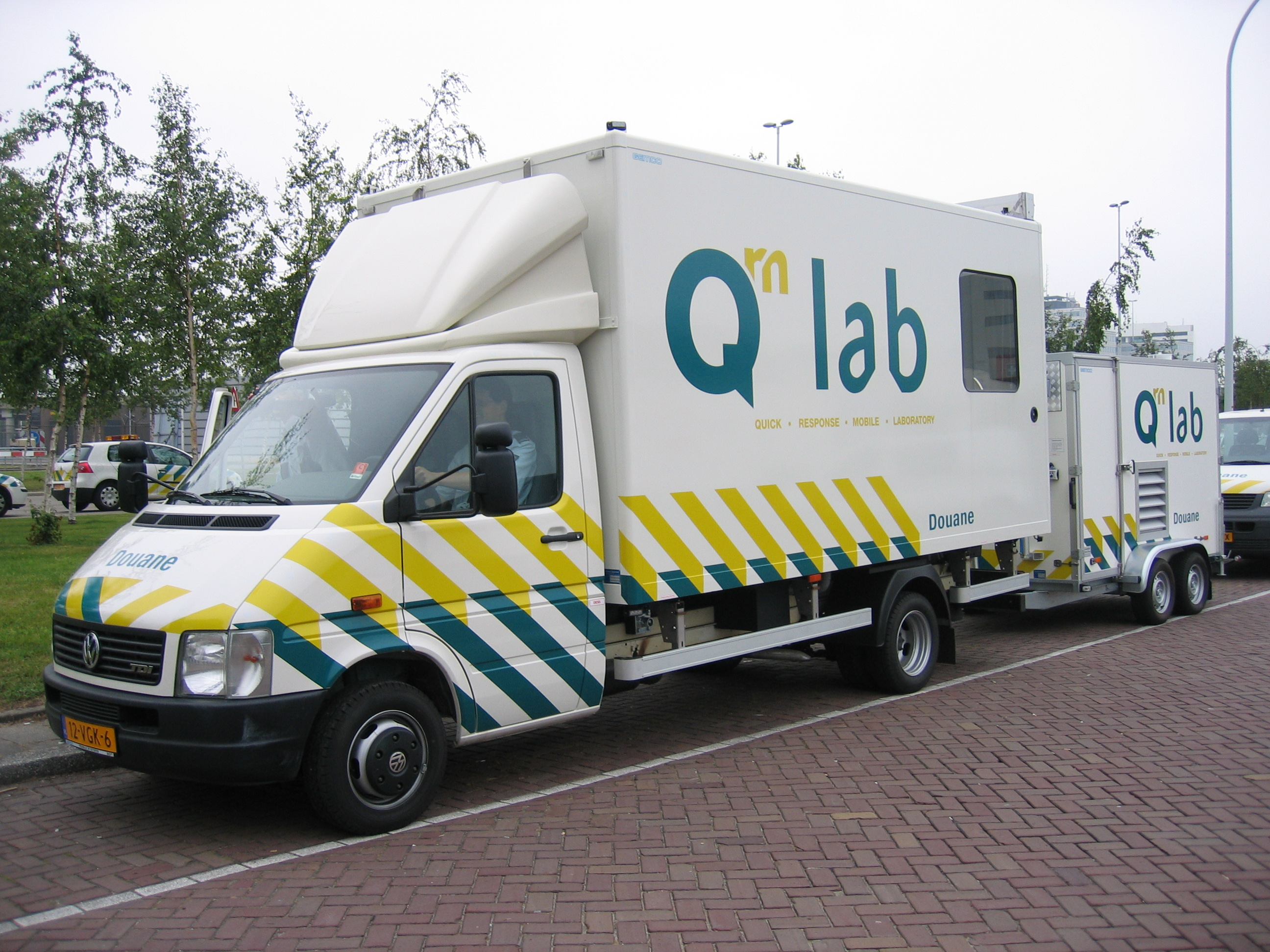 Foto mobiel Douane Laboratorium